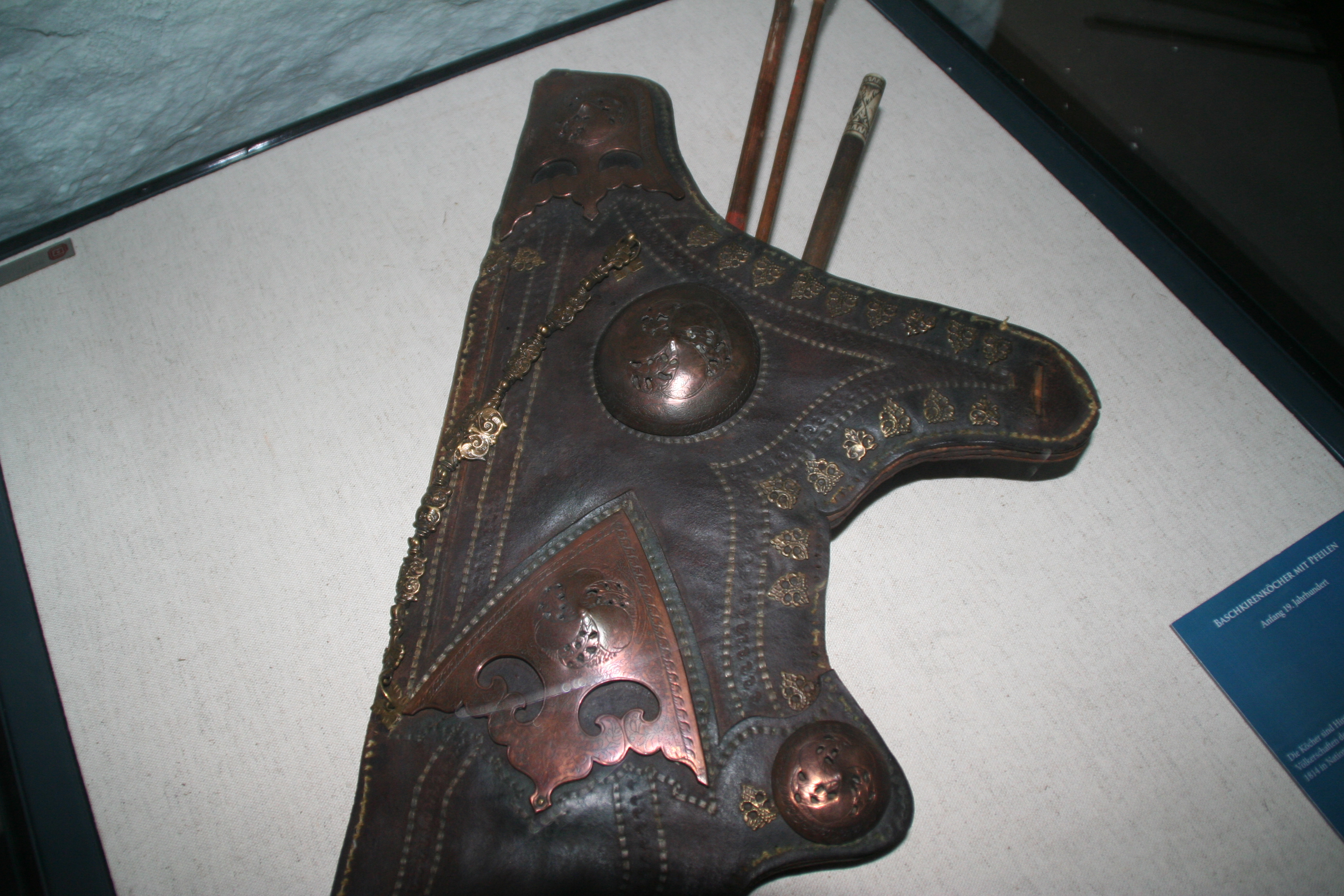 Башкирский колчан со стрелами в музее г. Эрфурт, Германия Башҡортса: Башҡорт уҡ һаҙағы. Эрфурт, Германия. Н.Йөрөшбаев архивынан